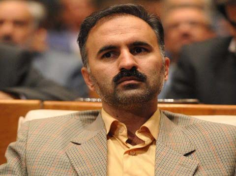 دکتر محمدرضا سجادیان